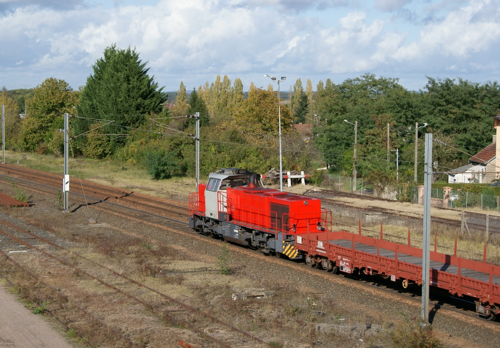 Une G 1206 VFLI sur le Bourbonnais